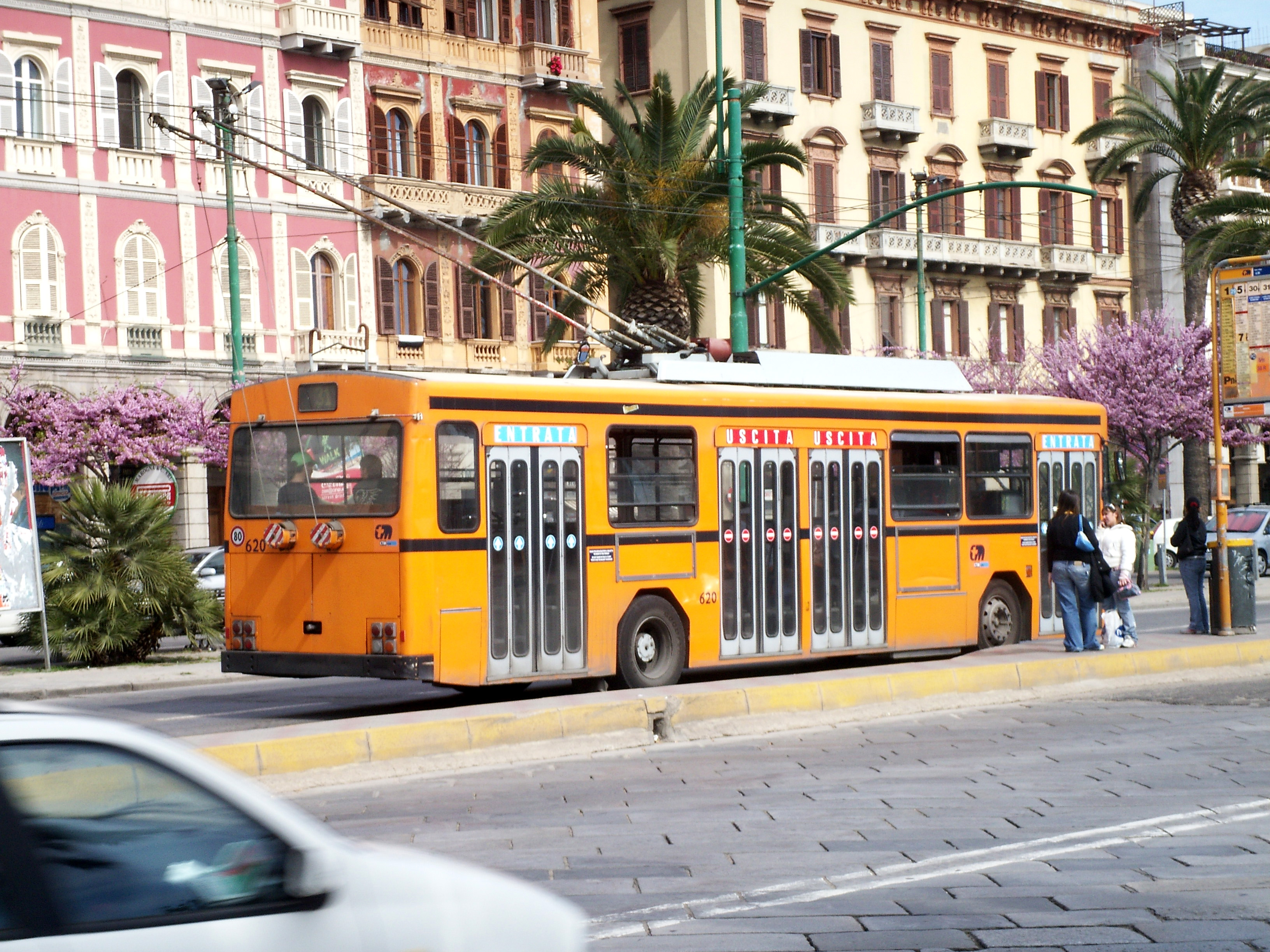 filobus F8839 accumulatori